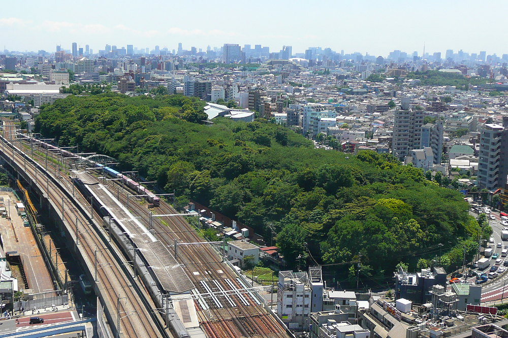 Asukayama Park, Kita, Tokyo.